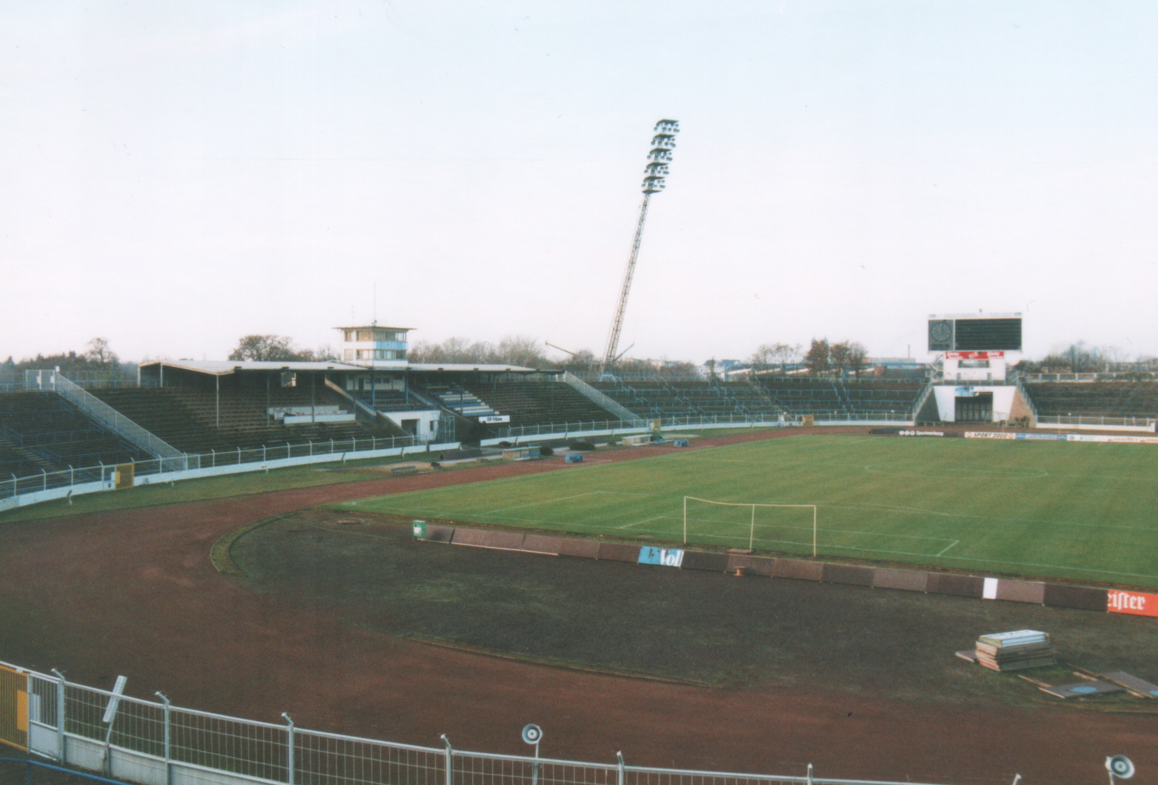 Haupttribüne Ernst-Grube-Stadion Magdeburg